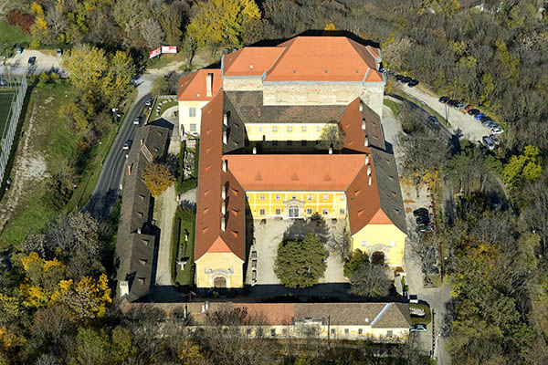 Kiscelli Múzeum